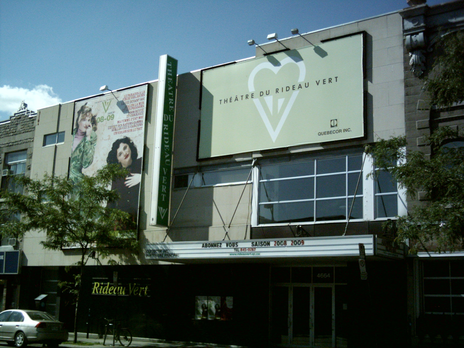 Le Théâtre du Rideau Vert est situé au 4664 rue Saint-Denis à Montréal.